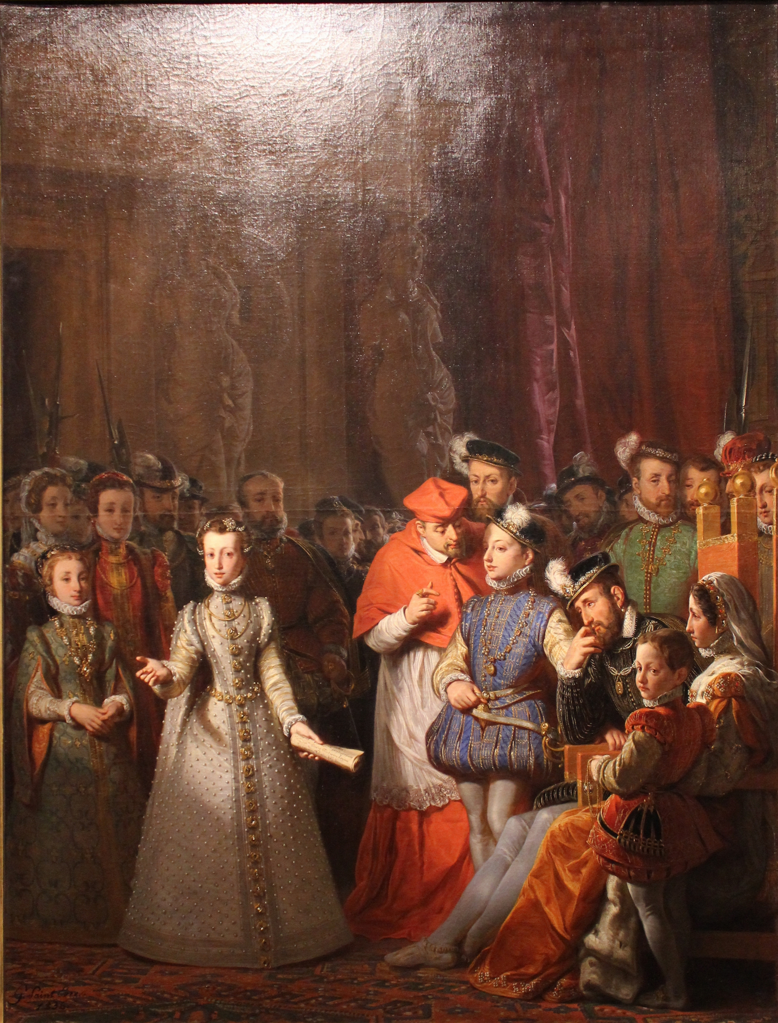 L’Éducation de Marie Stuart à la cour de François II, peinture de Gillot Saint-Èvre en 1836, exposé au Musée des beaux-arts de Lyon en 2014.